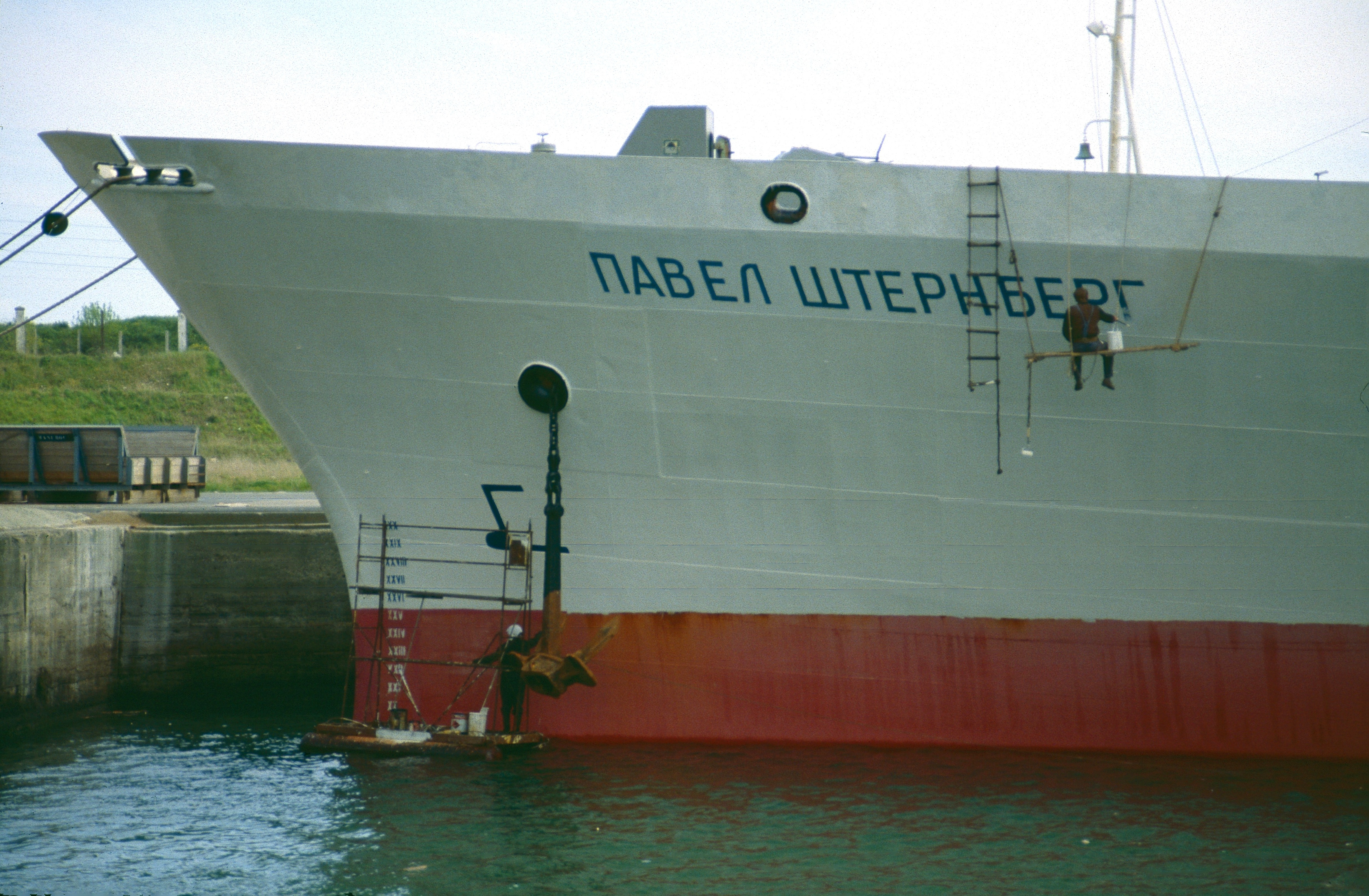 La proue d' un navire cargo vue de profil. Cargo soviétique "Pavel Sternberg". Cette photographie a été prise au port de commerce de La Rochelle-Pallice en mai 1989. La Rochelle, Charente Maritime, France.